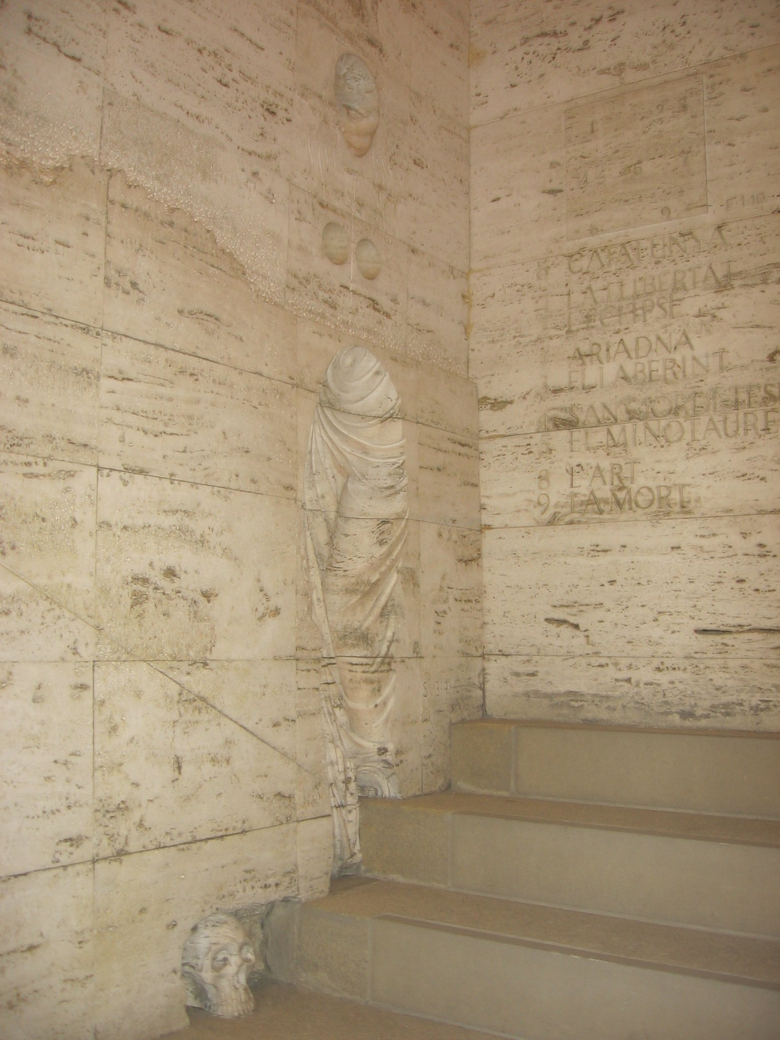 Relieve de San Jorge-Teseo, de Josep Maria Subirachs, Palau de la Generalitat de Catalunya.